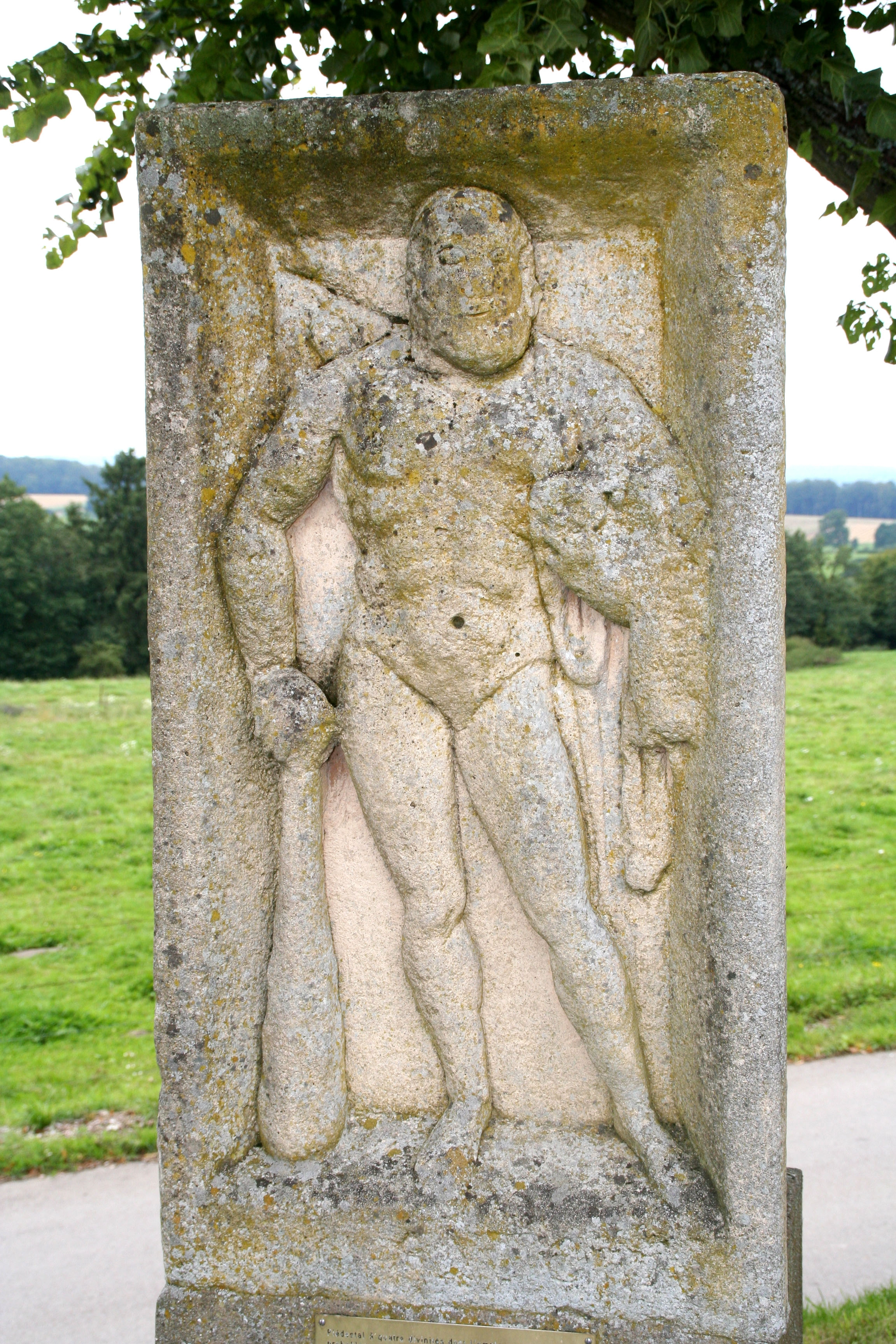 Schéimerech 2. Kategorie:Gemeng Kielen